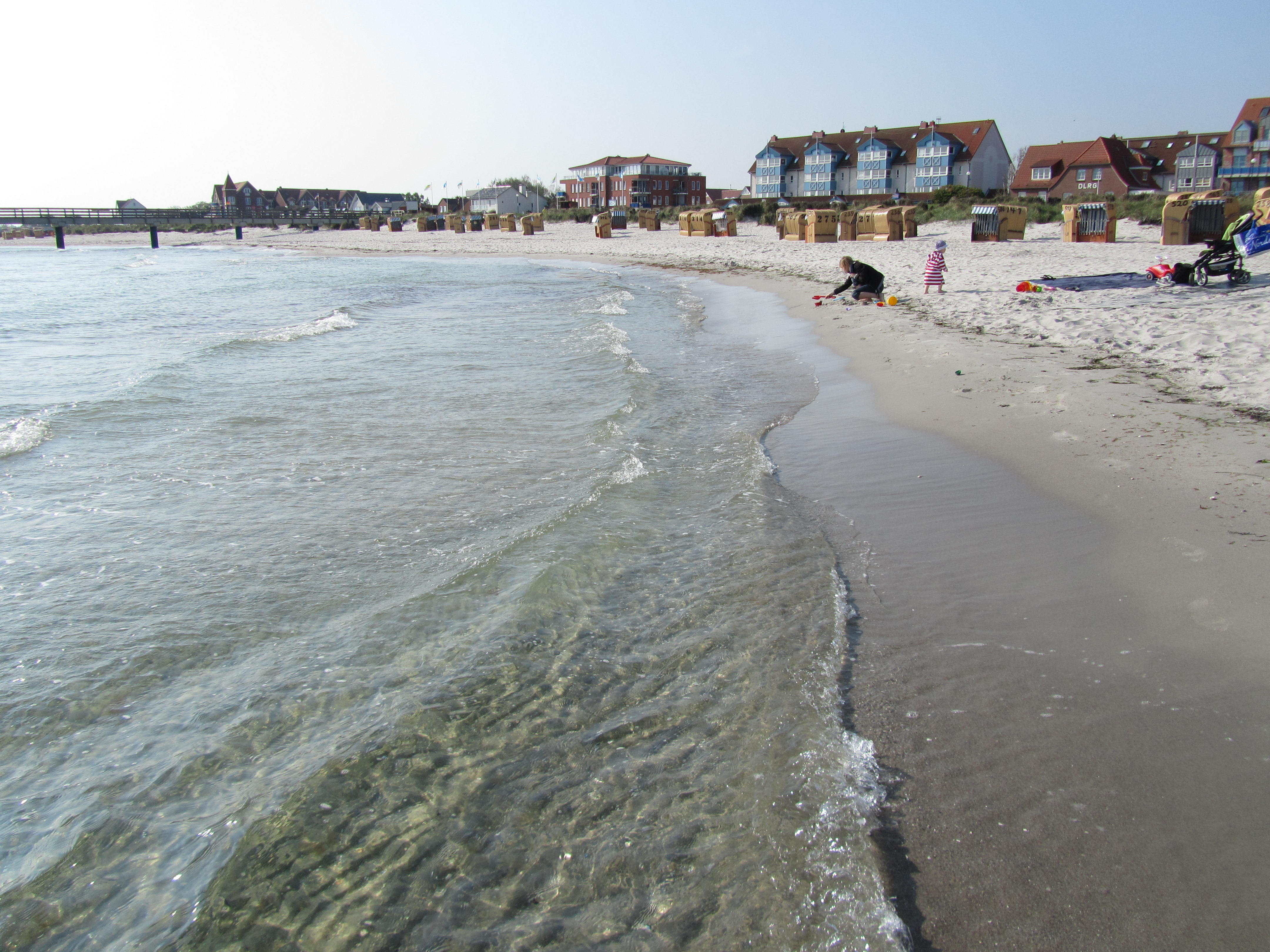 Strand von Schönberger Strand zwischen Buhne 38 und Seebrücke, Blick Richtung Osten.